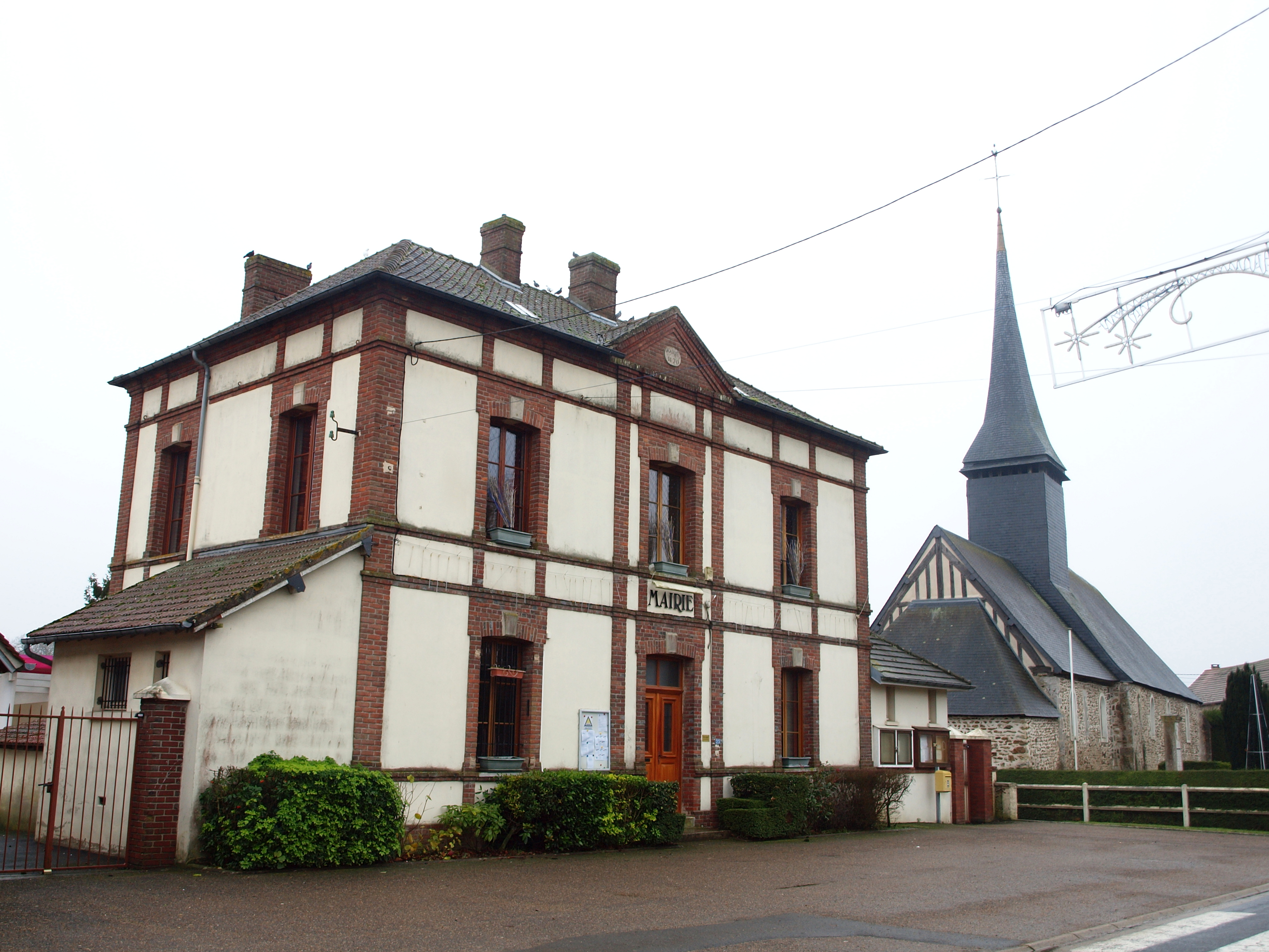 Saint-Julien-de-la-Liègue (Eure, France)